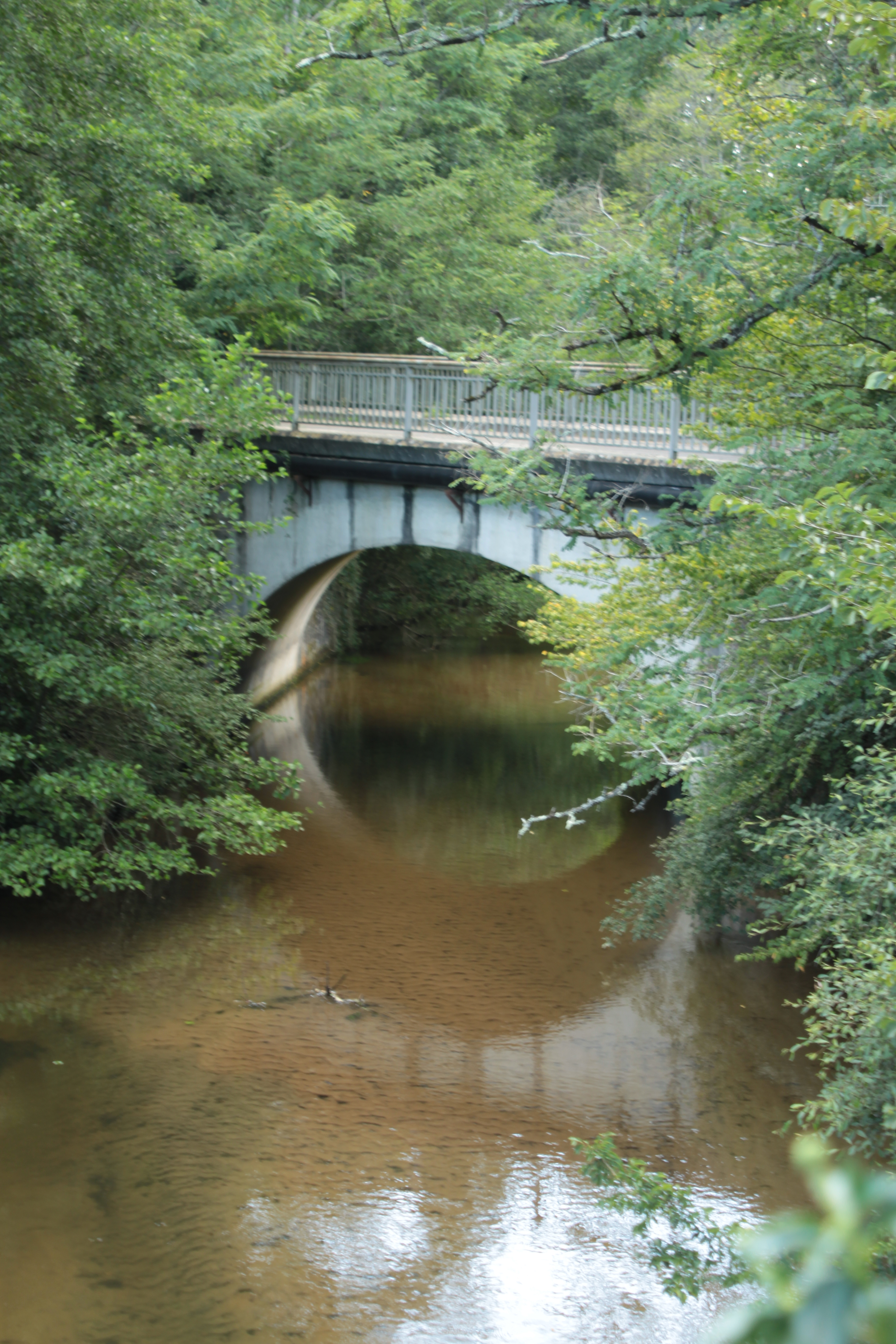 La Gouaneyre sous le pont au Hameau du Ginx (Commune d'Arue)